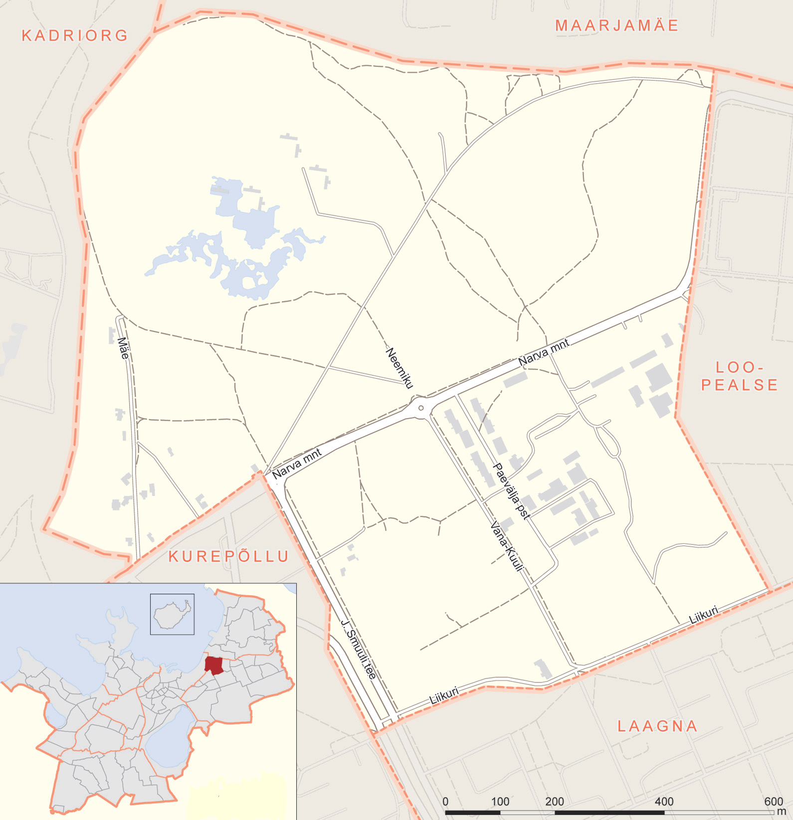 Paevälja asumi kaart